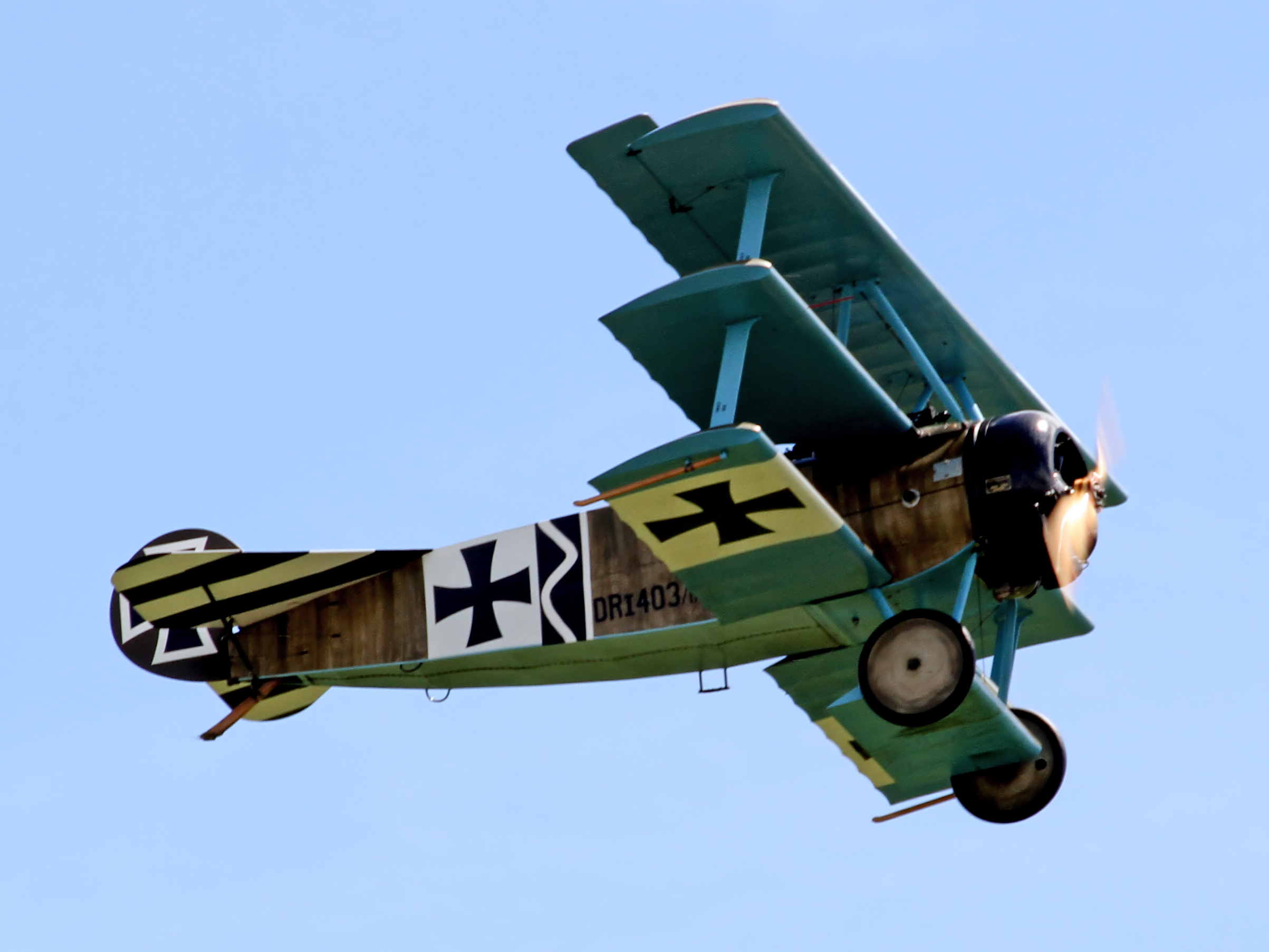 Fokker Triplane